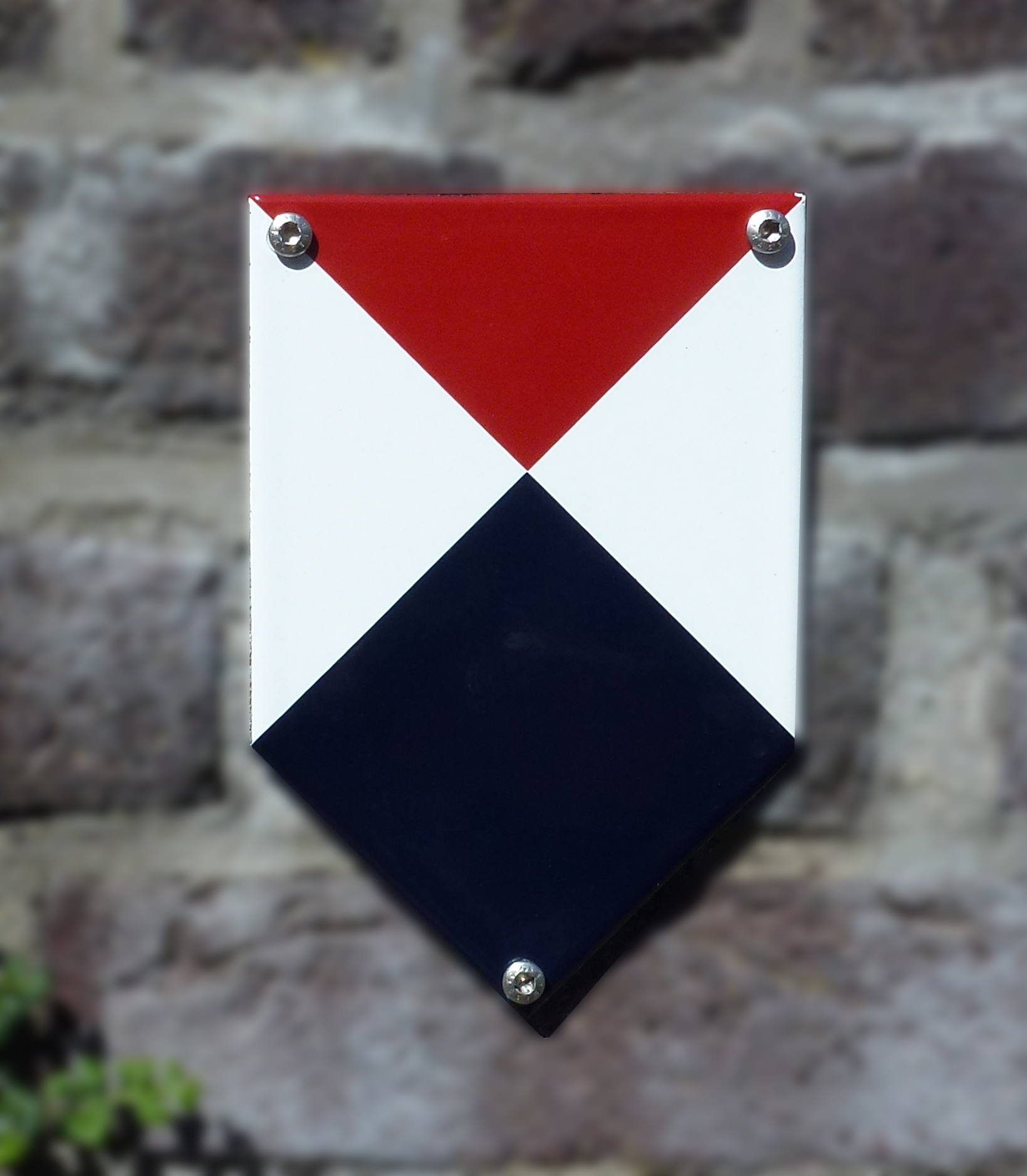 Water en erfgoed schildje met rood en donker blauw. Het schildje wordt door ICOMOS Nederland toegekend aan een historisch watersysteem.